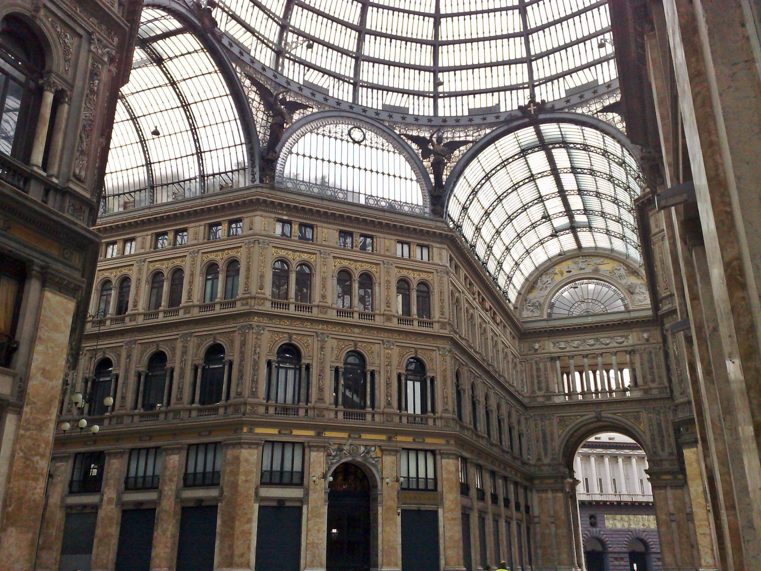 Interno della Galleria Umberto I (Napoli). Uscita sul Real Teatro San Carlo